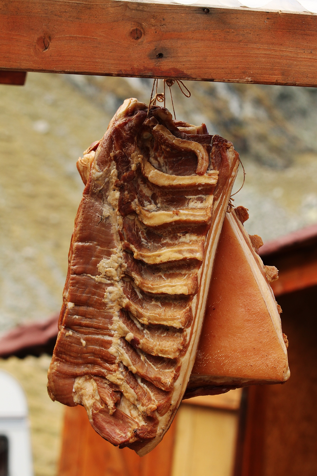 Costiță de porc afumată